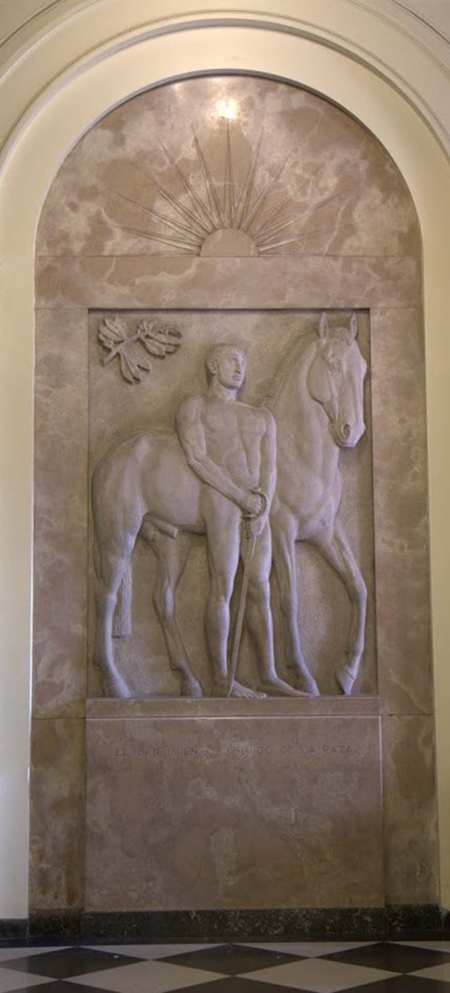 Salón de los Bustos, Casa Rosada